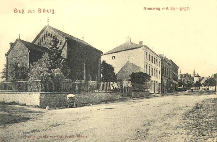 54634 Bitburg, Trierer Straße 15, Kreismuseum Bitburg-Prüm. Die Synagoge in Bitburg wurde von Kreisbaumeister Peter Josef Julius Wolff entworfen und ab 1877 errichtet. Die Synagoge stand etwas erhöht auf einem eingefriedeten Grundstück und befand sich in der Rautenbergstraße. Aufnahme von 2018.